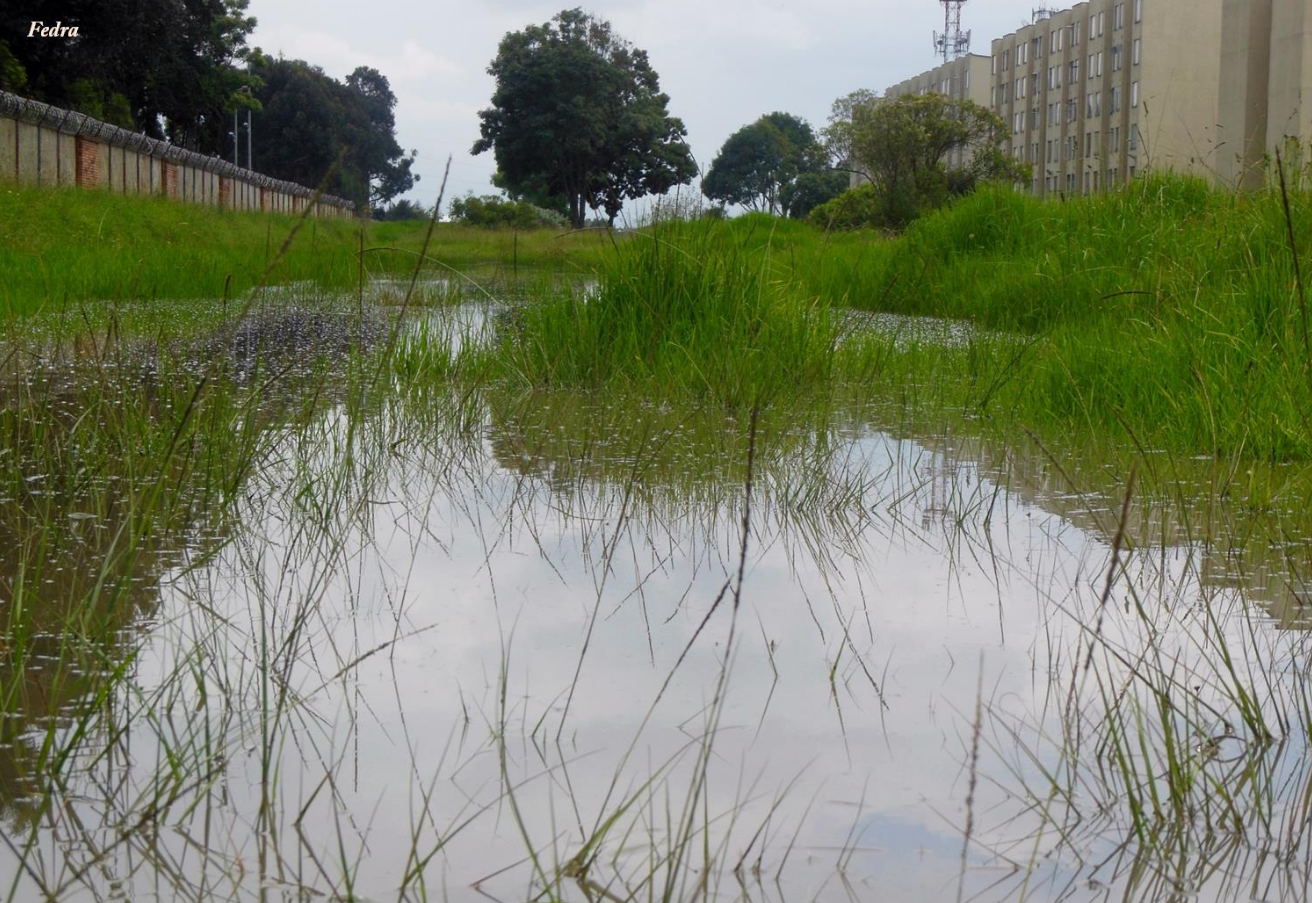 Espejo de agua en el Humedal Madre de Agua